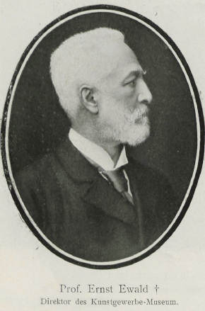 Ernst Ewald (1836-1904), deutscher Maler, Direktor des Kunstgewerbemuseums in Berlin.